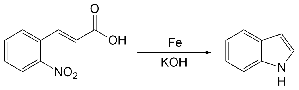 Baeyer-Emmerling-indoolsynthese: algemeen verloop